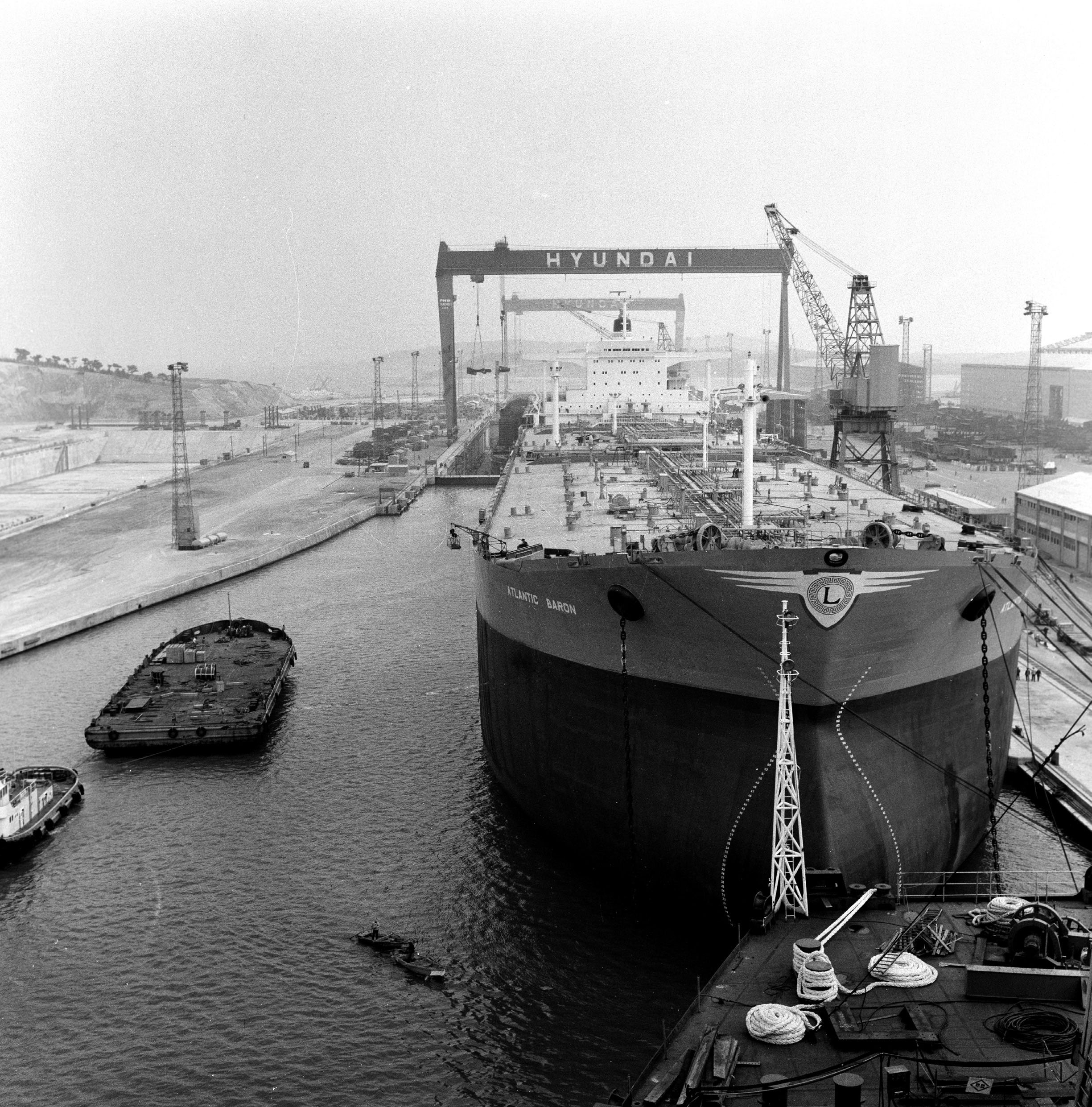 촬영일 : 1976년 12월 06일 촬영장소 : 대한민국 울산 현대조선소 참석자 : 없음 Atlantic Baron (IMO 7355882) 건조 중.